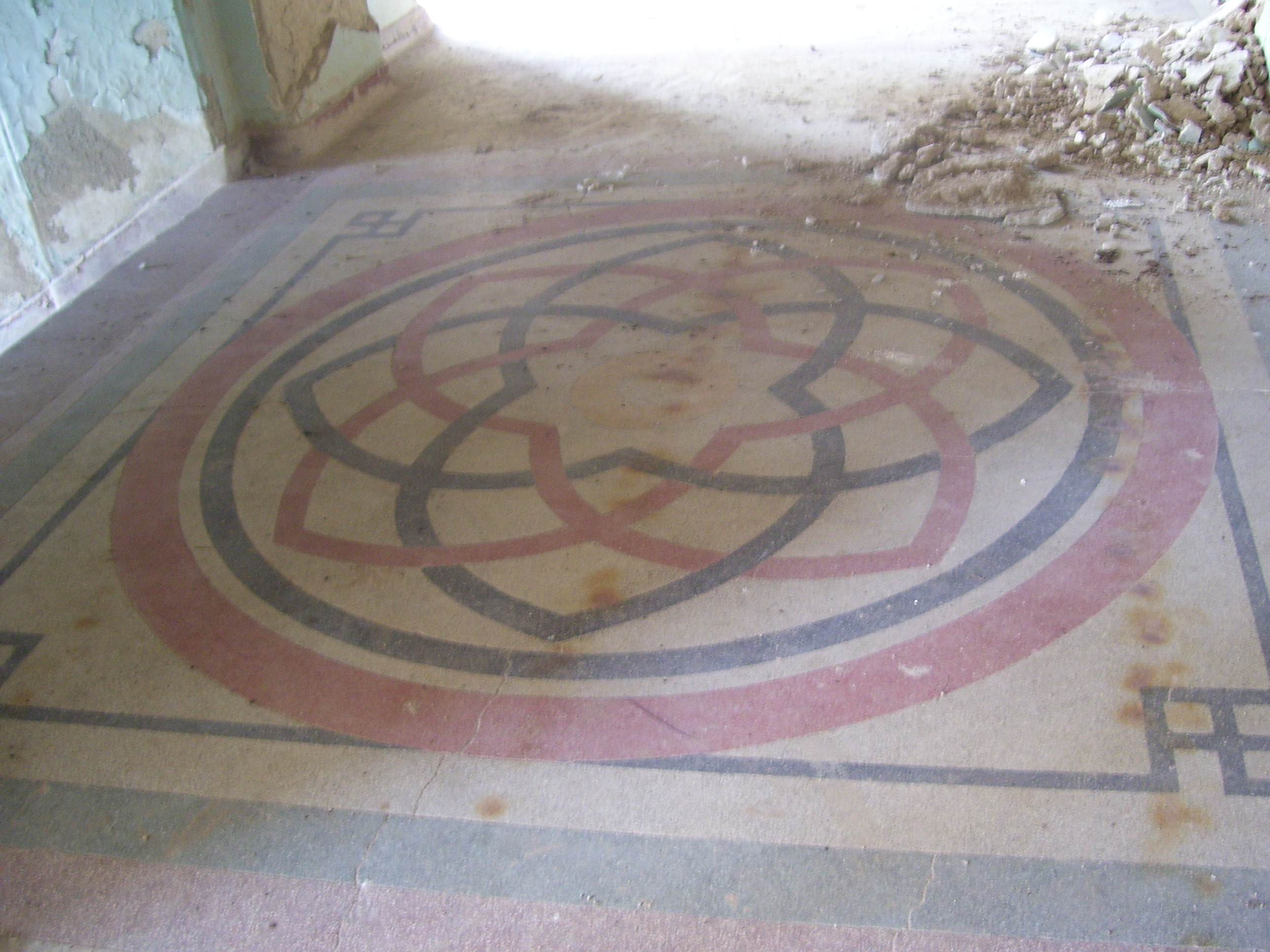 Realnı məktəbinin binası. XX əsr. Şuşa şəhəri, keçmiş 1 May küç., 1